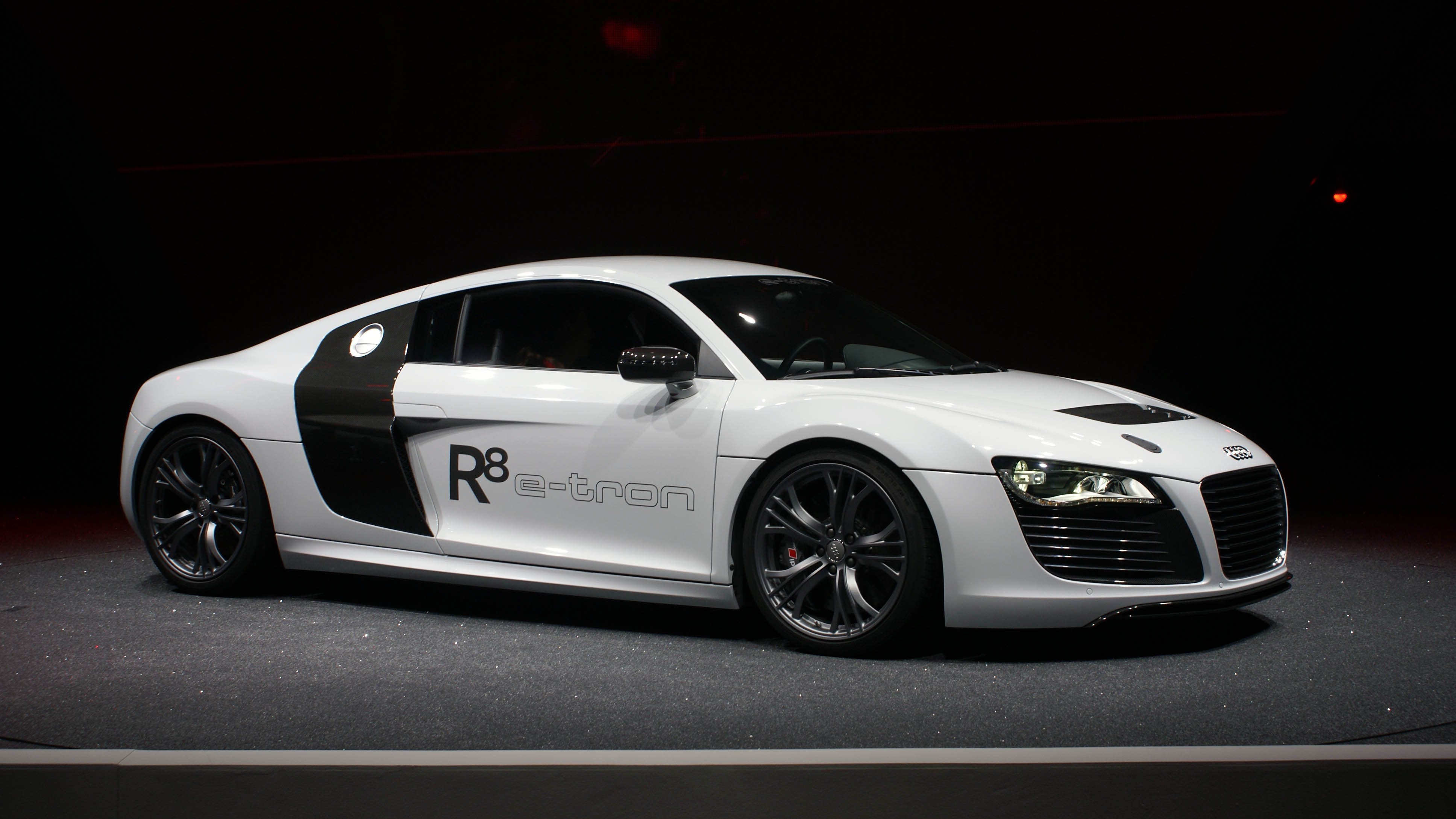 Audi R8 e-tron.